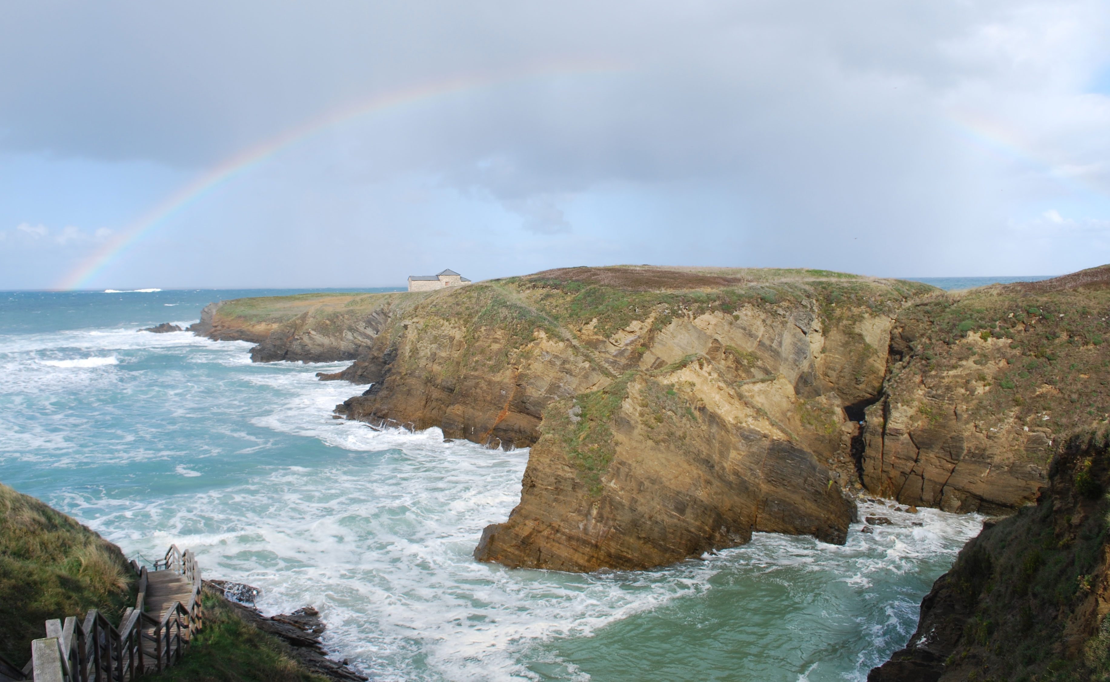 Castro de Santa Comba Illa vista dende o aceso á praia Covas Ferrol A Coruña Galiza Spain